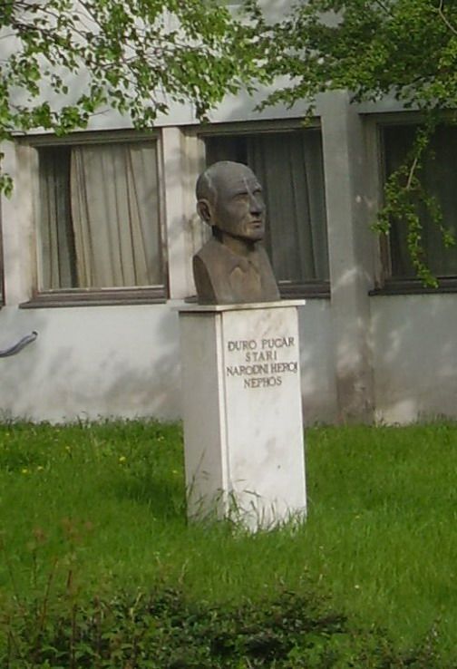 Ђуро Пуцар Стари, биста испред фабрике вагона Братство у Суботици.